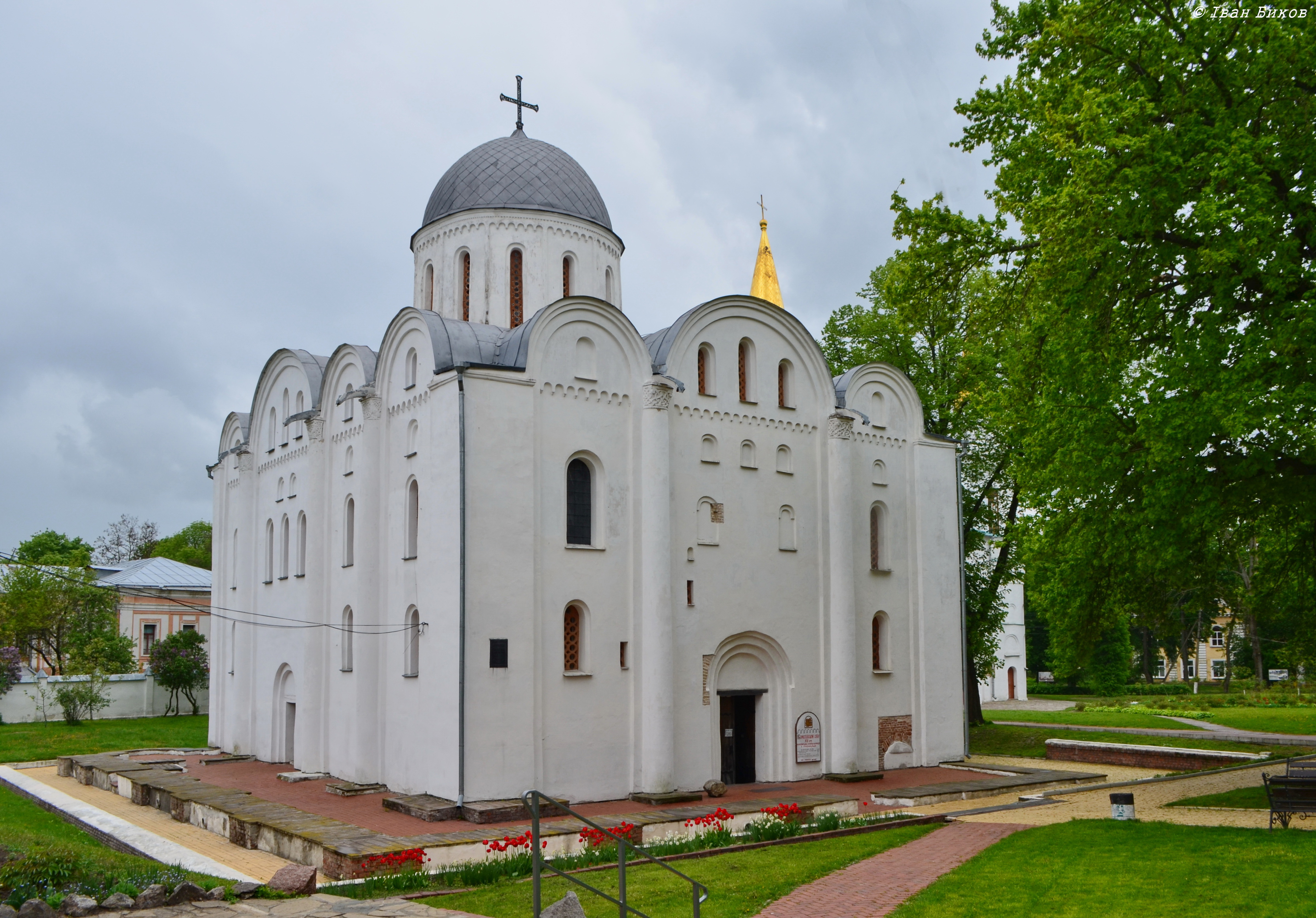 м. Чернігів. Собор Бориса й Гліба. 1120-1123 роки побудови. Безцінна пам'ятка давньоруської архітектури Чернігівського князівства.